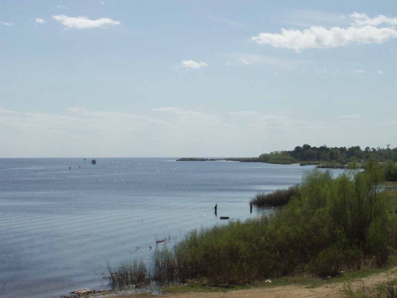 Ilmen Lake, near Velikiy Novgorod